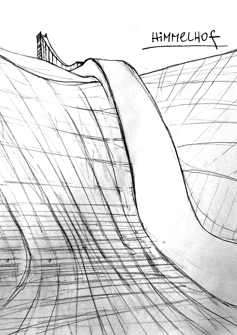 Kohlezeichnung der Himmelhofschanze (1949-1980), gezeichnet 2005 am Originalschauplatz. Zum Zeitpunkt der Herstellung der Kohlezeichnung war der gesamte Sprunghügel vorhanden, die Darstellung des Sprungturms erfolgte anhand der unzähligen Archivfotos. Charakteristisch für die Schanze ist die sogenannte "Schlucht", eine nur etwa 6m breite Grube, durch die die Springer nach ihrer Landung fahren mussten. K-Punkt: 45m bei 34°=68% Gefälle.